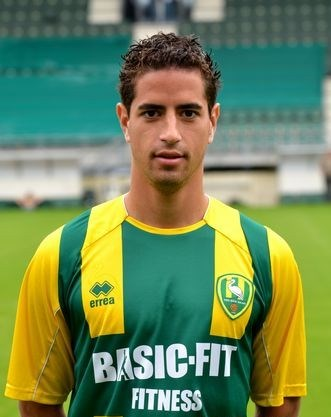 Christian Supusepa